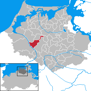 Semlow in Mecklenburg-Vorpommern - District Nordvorpommern